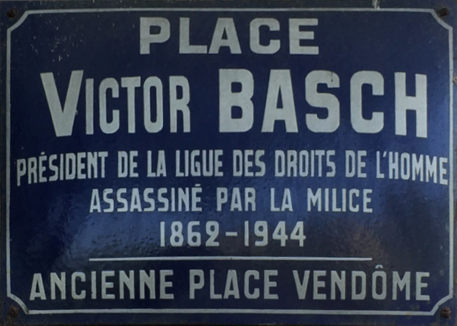 Panneau de la place Victor-Basch à Lyon.